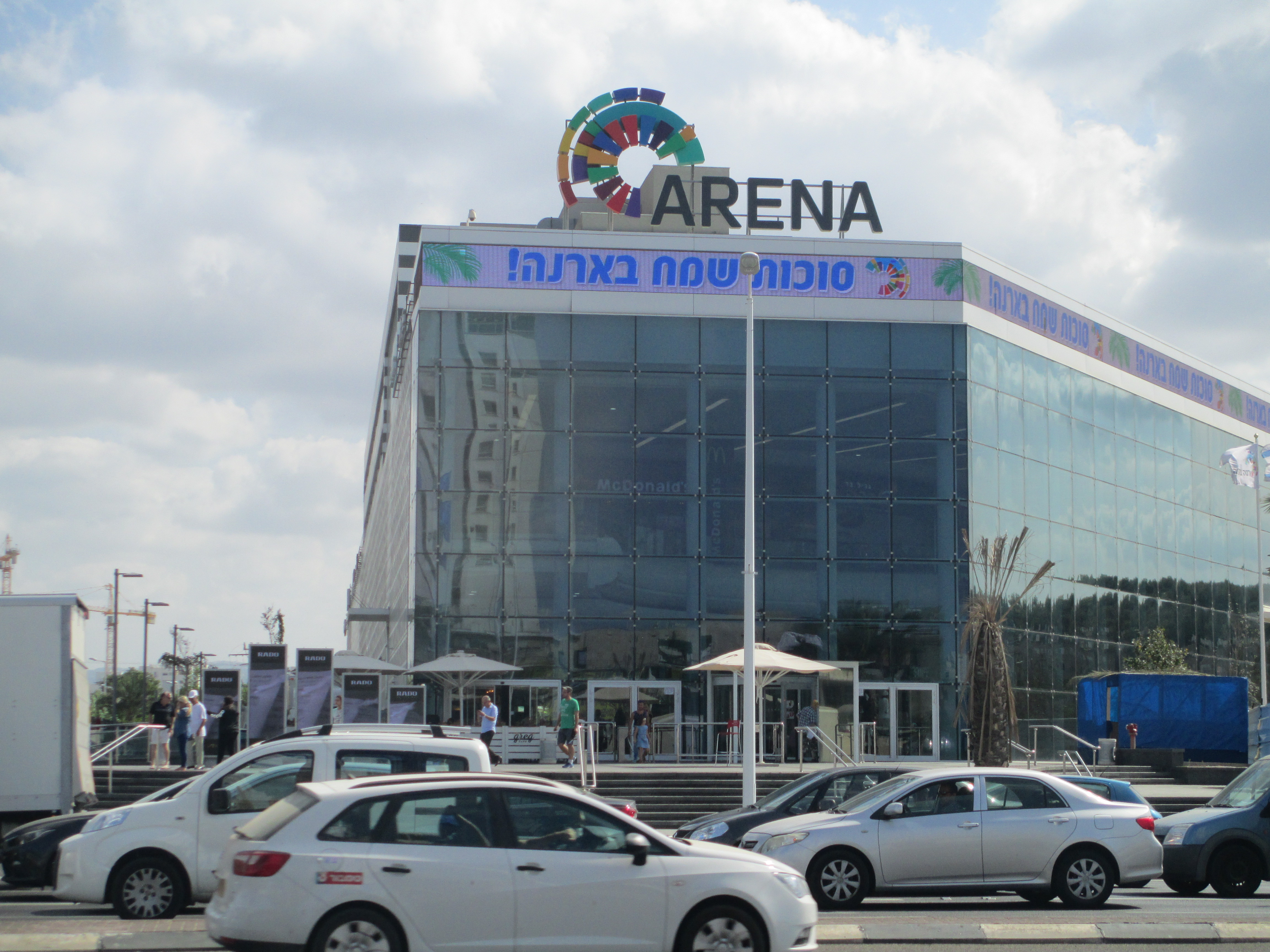 קניון ארנה בנהריה